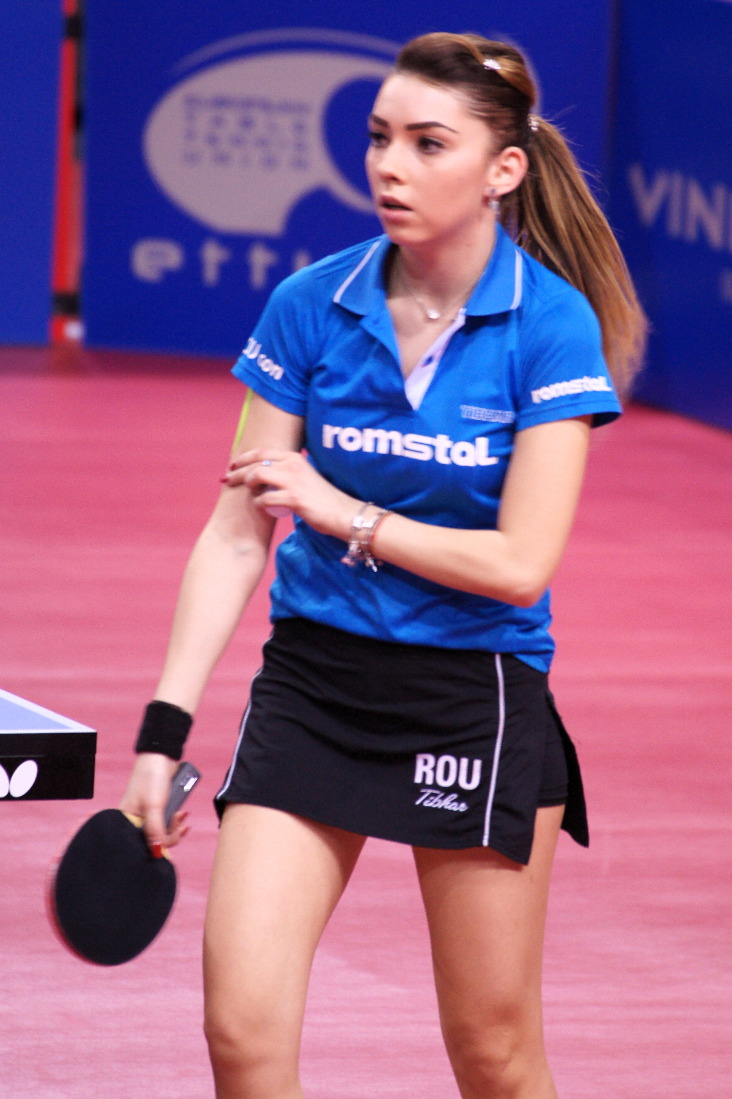 Bernardette Szocs, Top 16 Antibes 2017